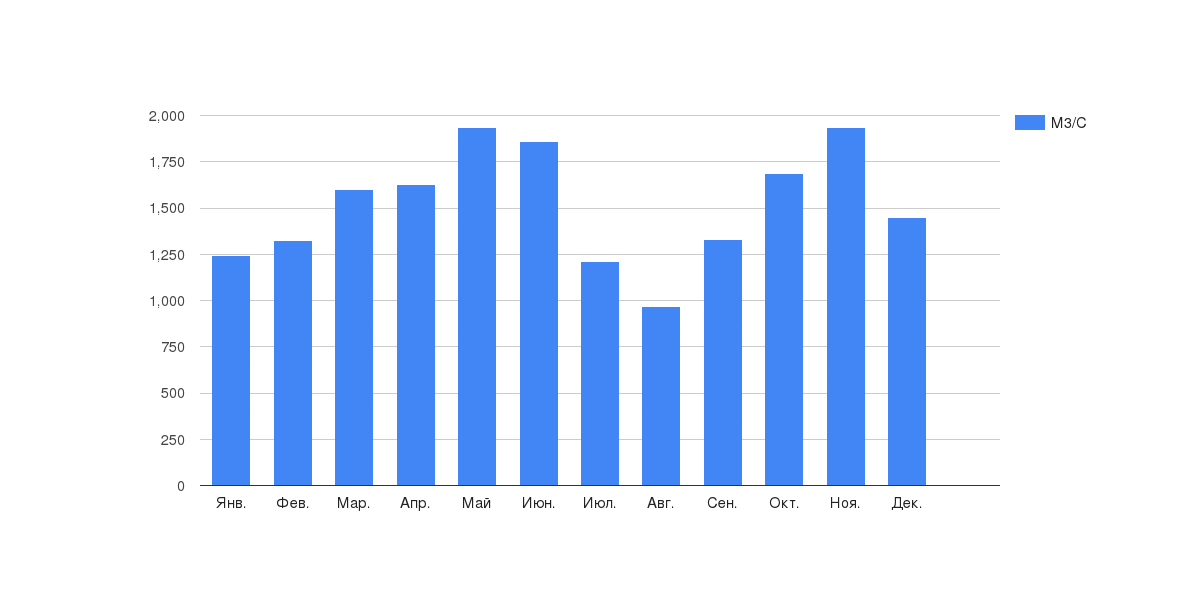 Диаграмма расходы воды в реке По.